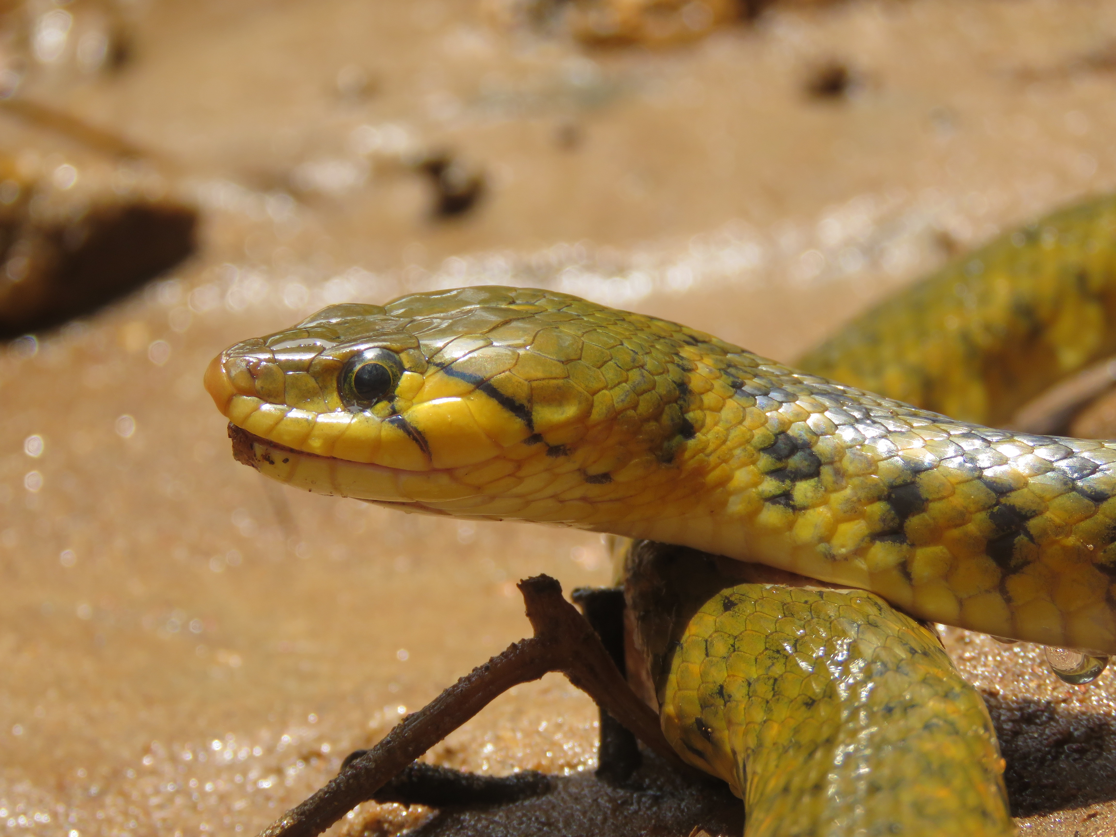 Photos by Vinayaraj